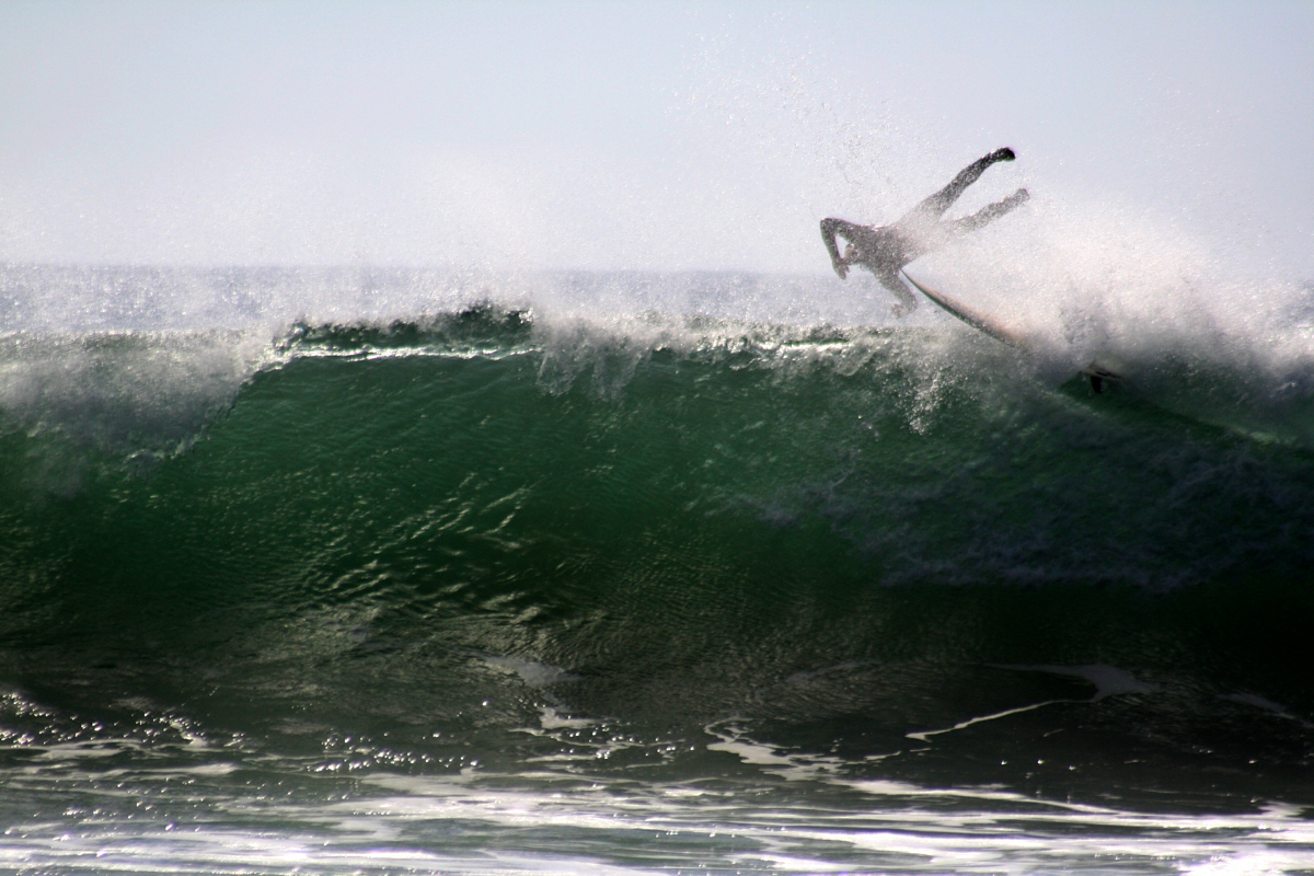 California surfer in Santa Cruz